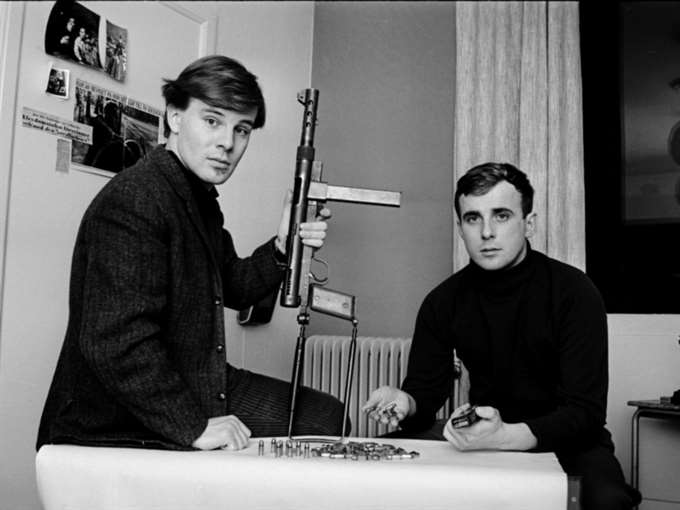 Foto på Jan Guillou och Arne Lemberg infört i FIB aktuellt 1967:4 sid 12.